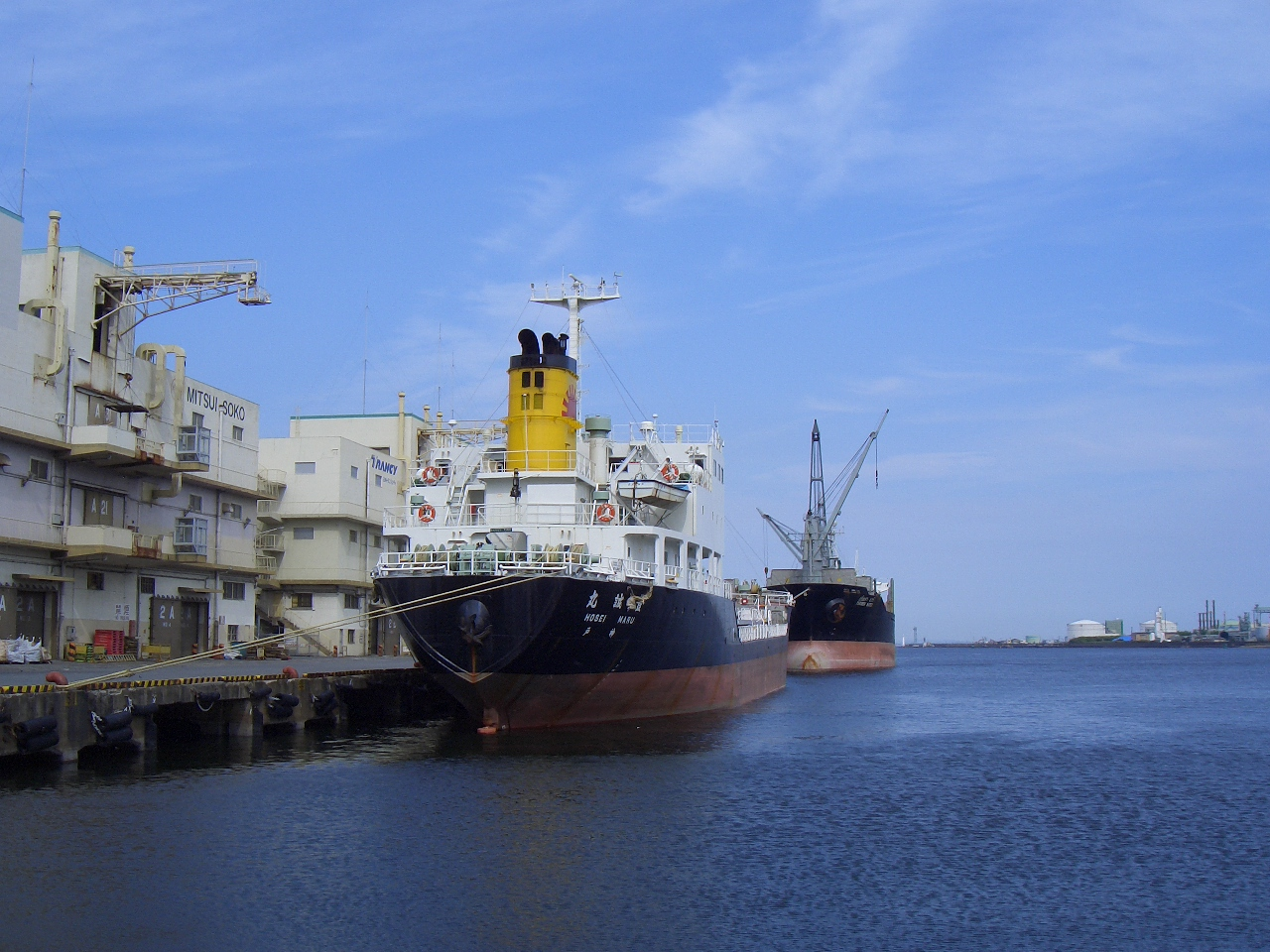 四日市港第二埠頭南側岸壁